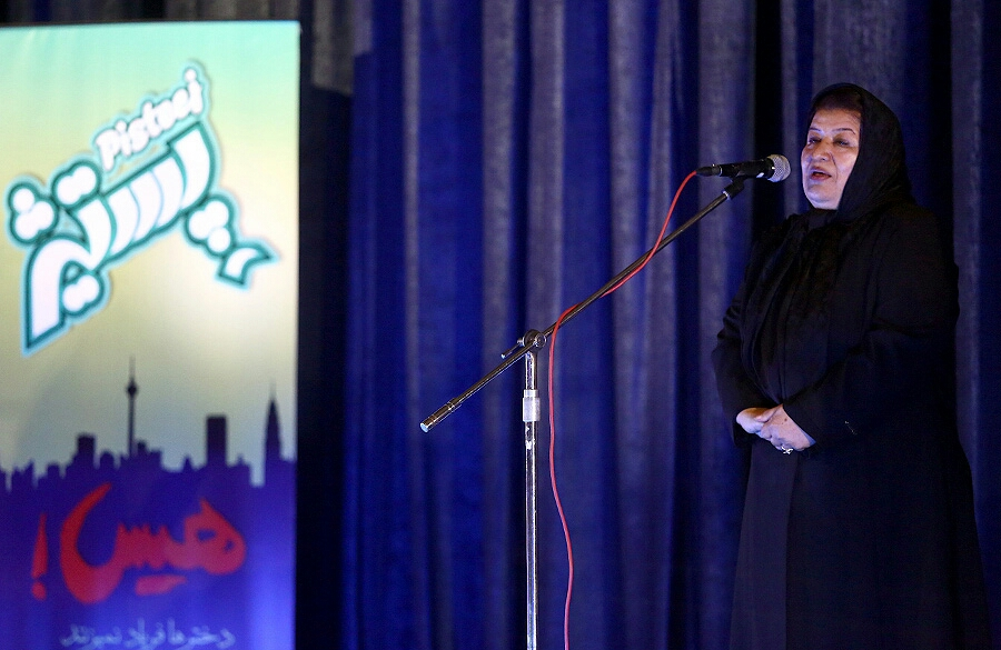 پوران درخشنده در مراسم رونمایی فیلم هیس! دخترها فریاد نمی‌زنند